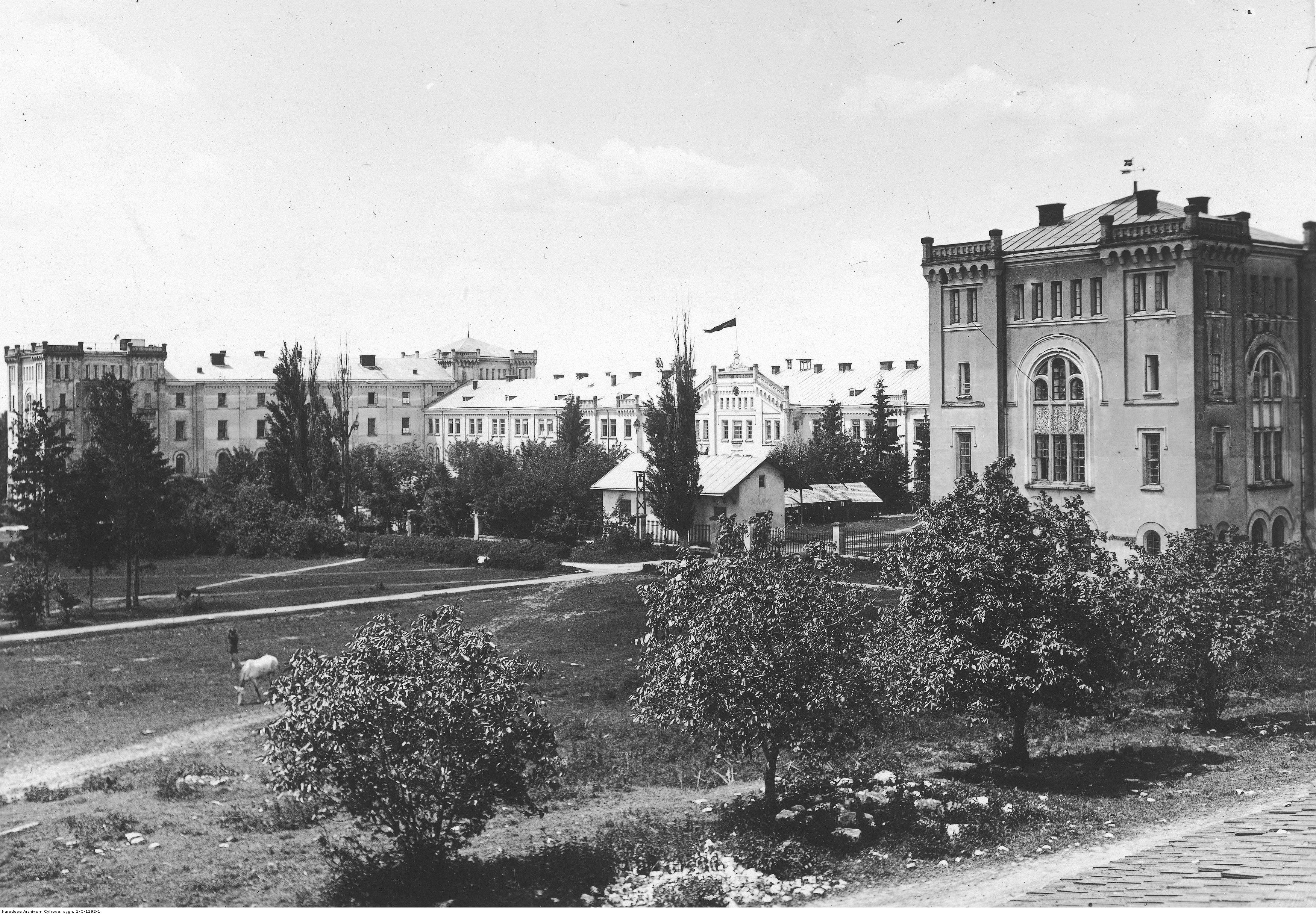 Zakład Sierot i Ubogich w Drohowyżu (1934) gmach